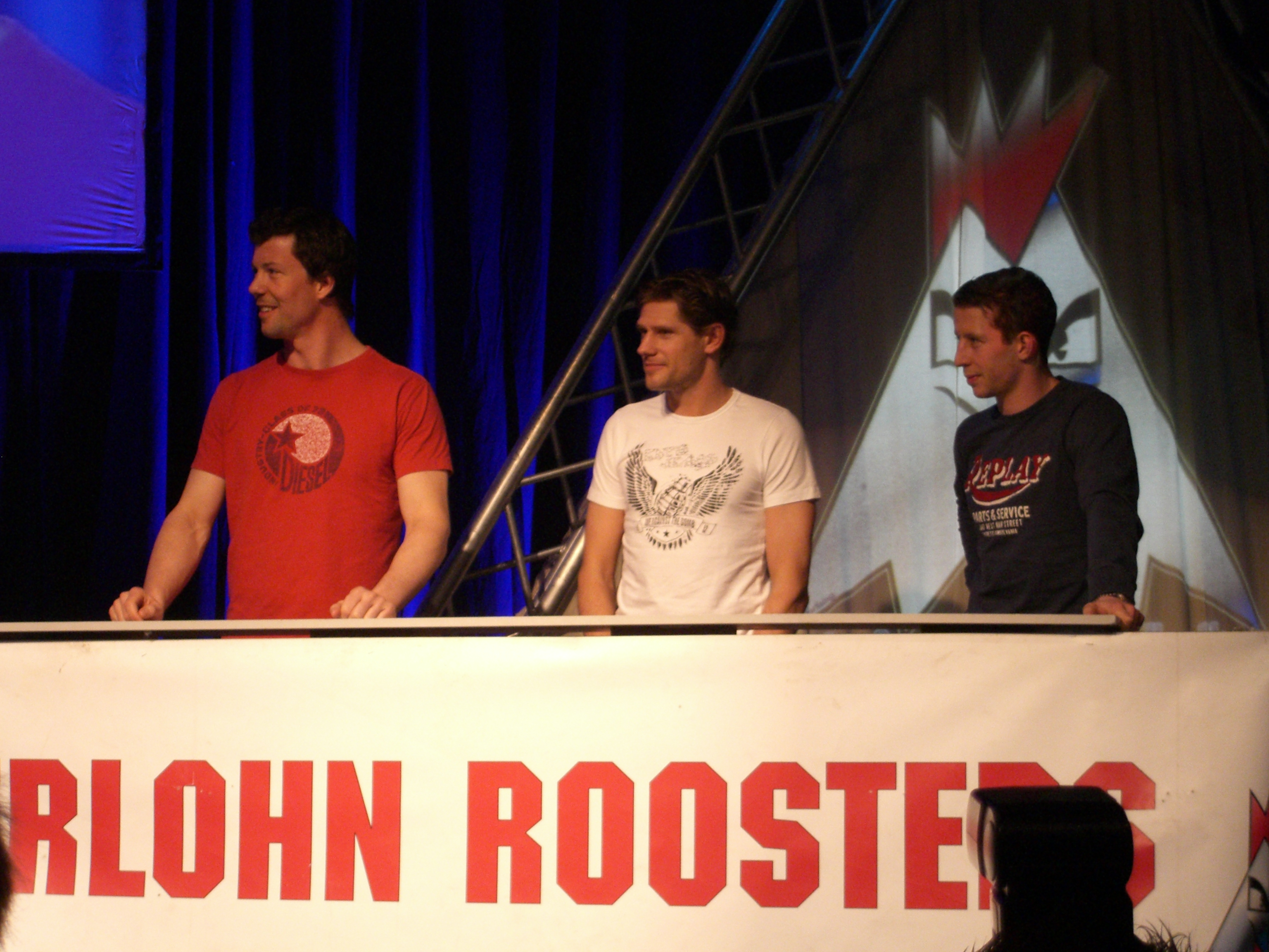 Erich Goldmann, Robert Hock and Michael Wolf, Iserlohn Roosters